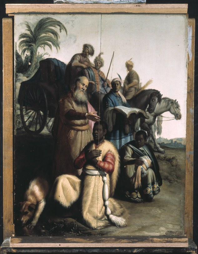 Gemonogrammeerd en gedateerd rechtsonder: RHL [Rembrandt Harmenszoon Leidensis] 1626.